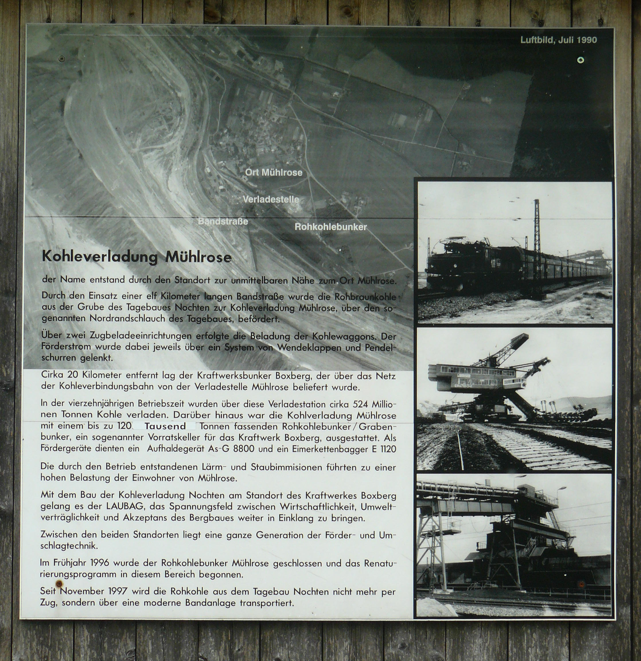 Mühlrose in Sachsen: Informationstafel über die Kohleverladung im Ort.